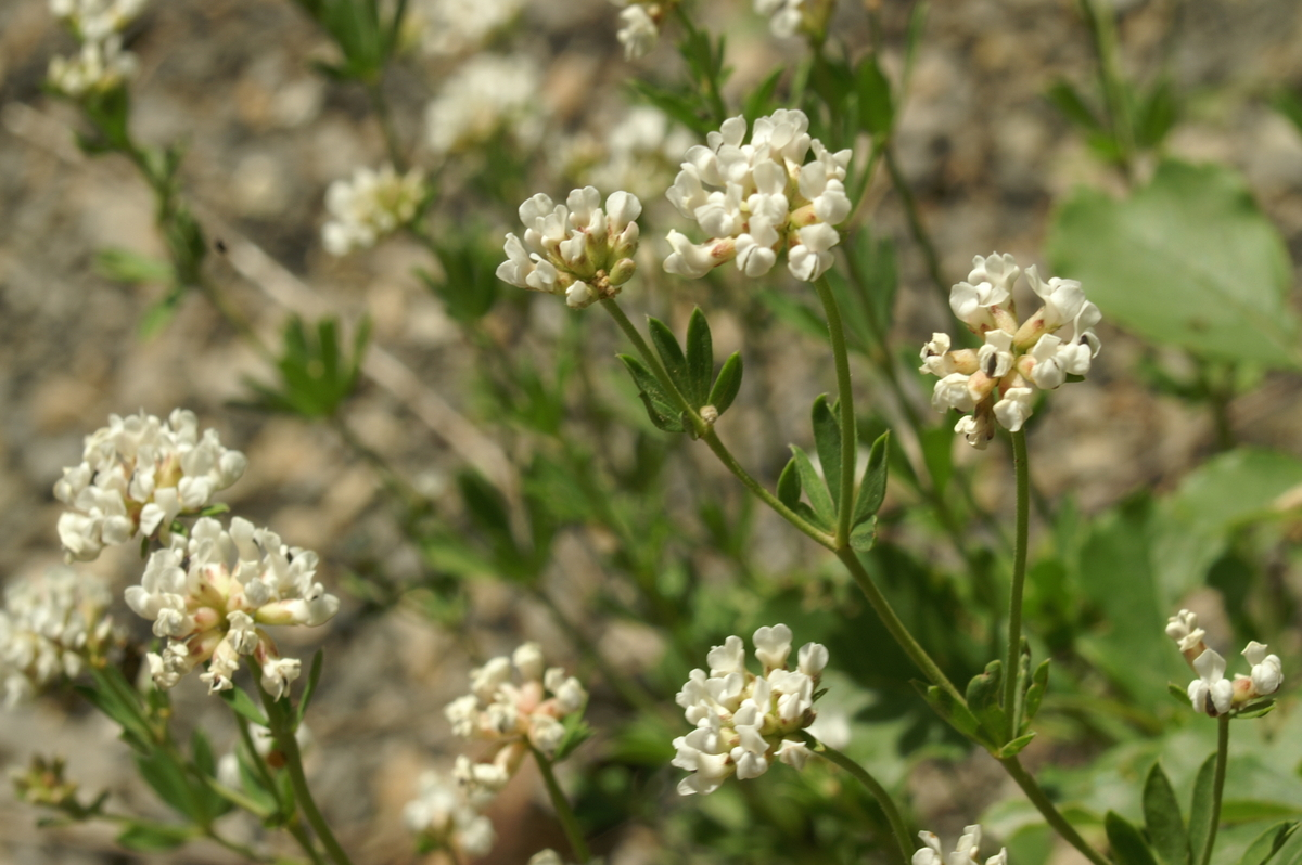 Mnogocvetna španska detelja v Selu.